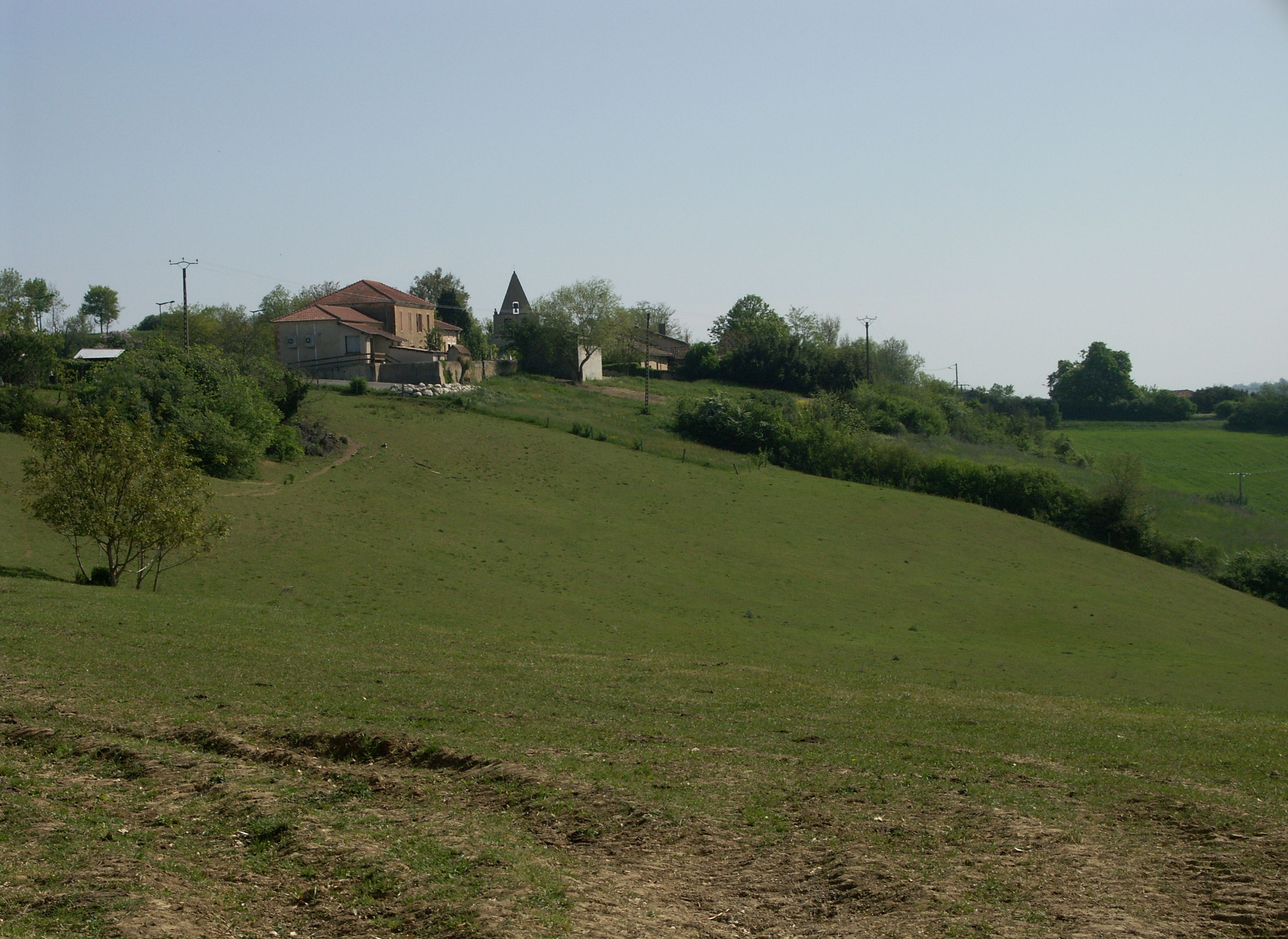 Vue de l'école et de la mairie d'Agassac (31)